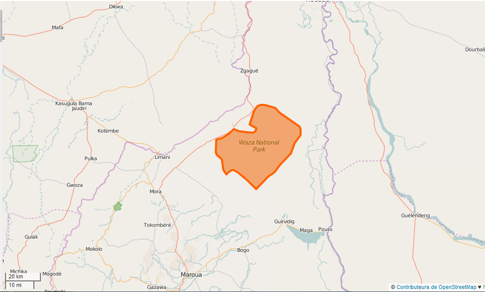 Parc national de Waza Limites This map may be incomplete, and may contain errors. Don't rely solely on it for navigation.